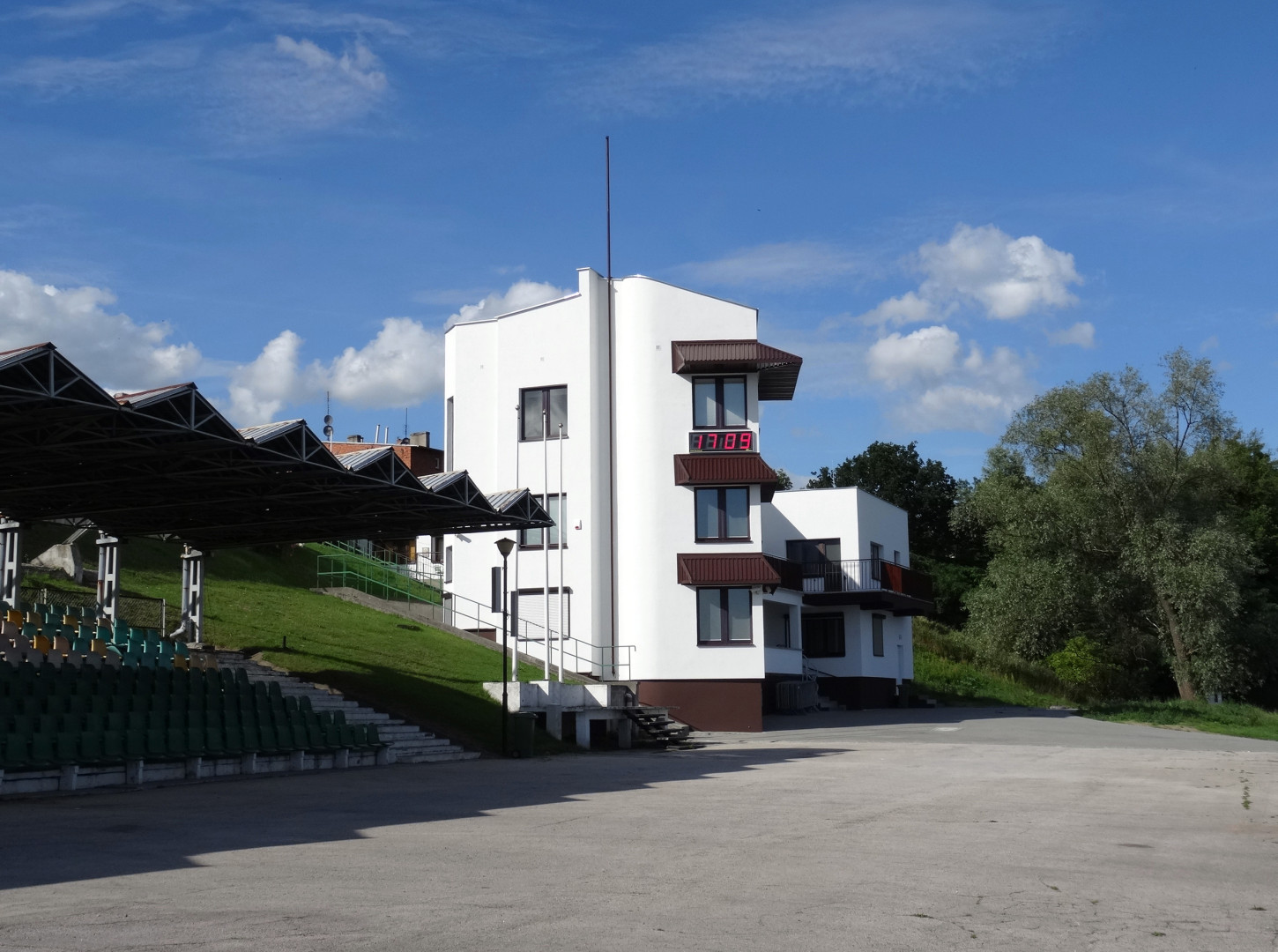 Tor regatowy w Bydgoszczy-Brdyujściu